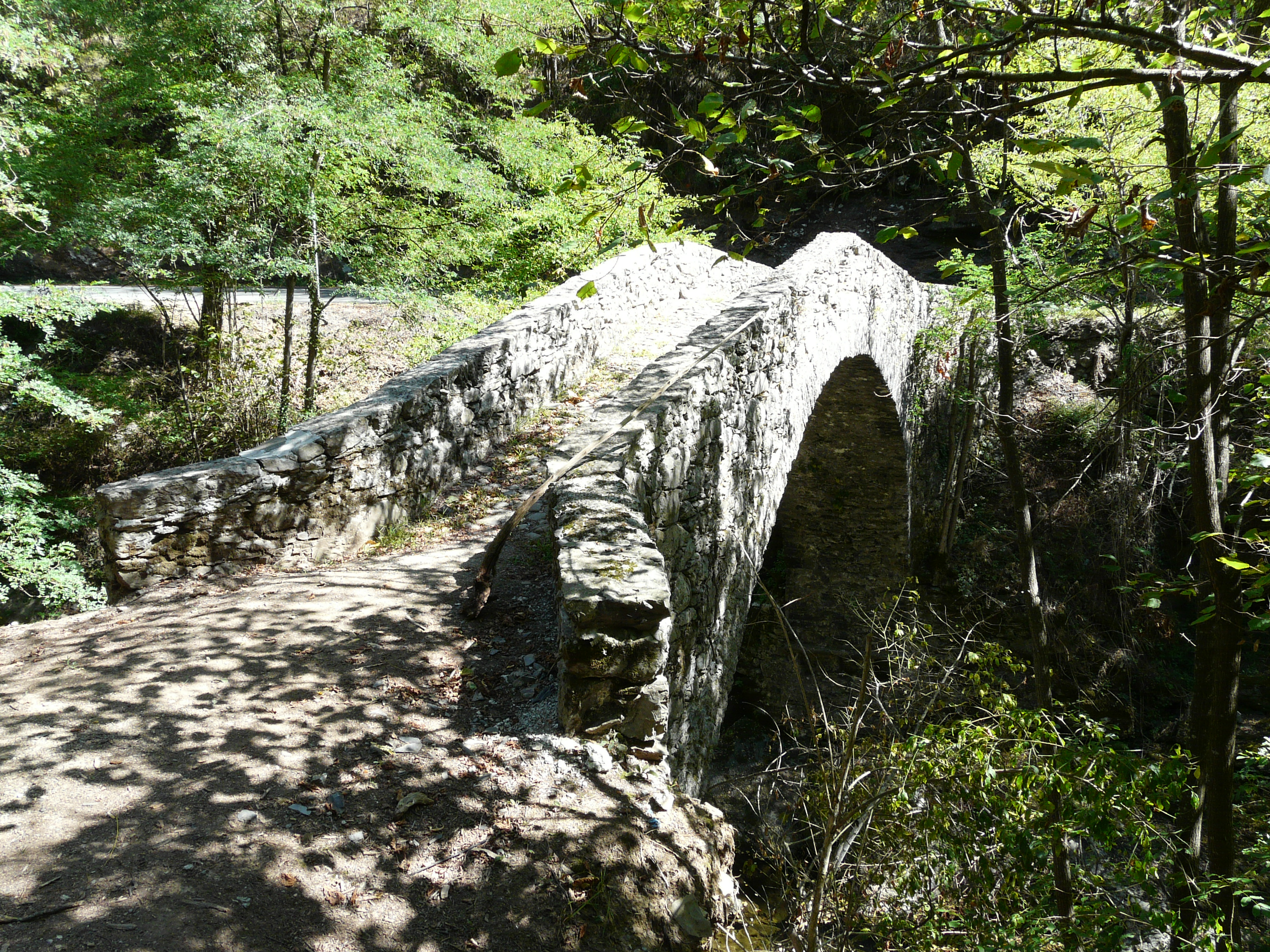 Ponte presso la frazione di Celesia, San Colombano Certenoli, Liguria, Italia